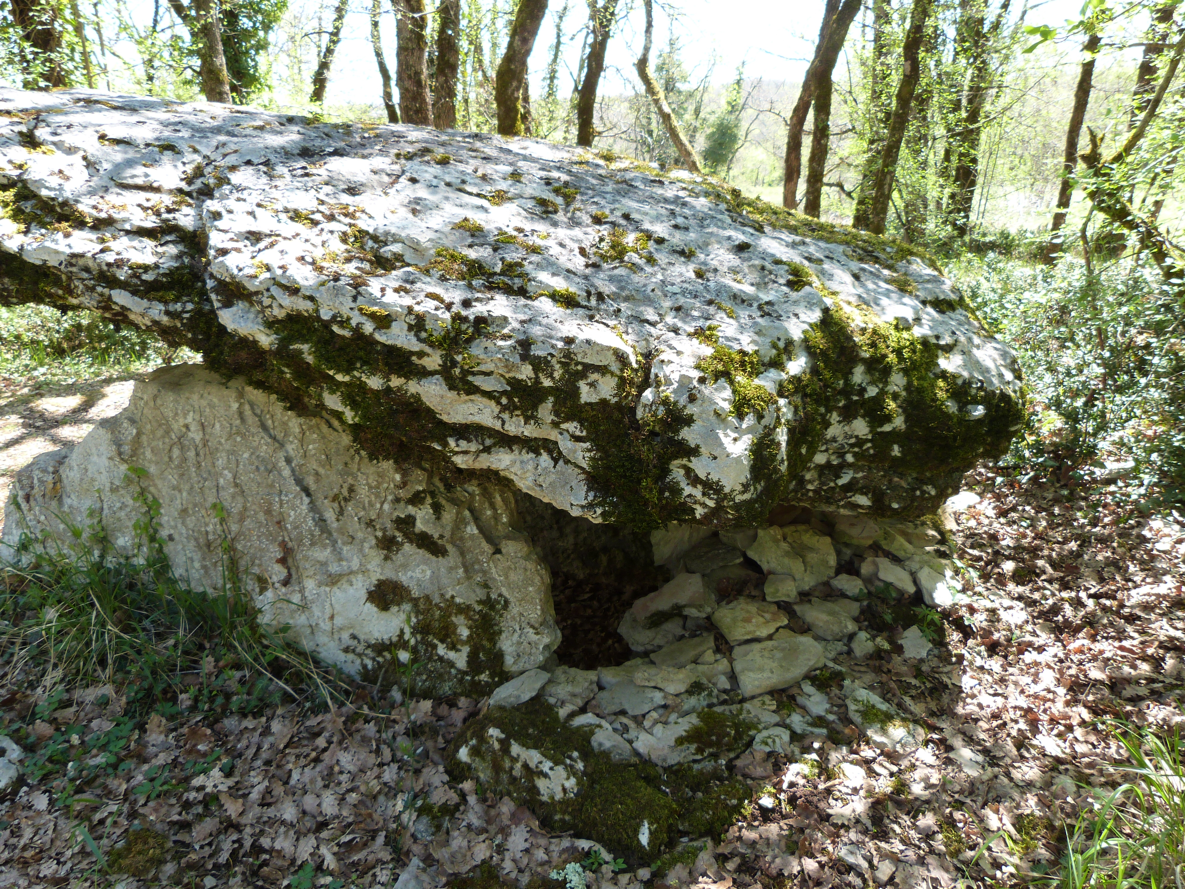 Dolmen de Maire-Gaillard